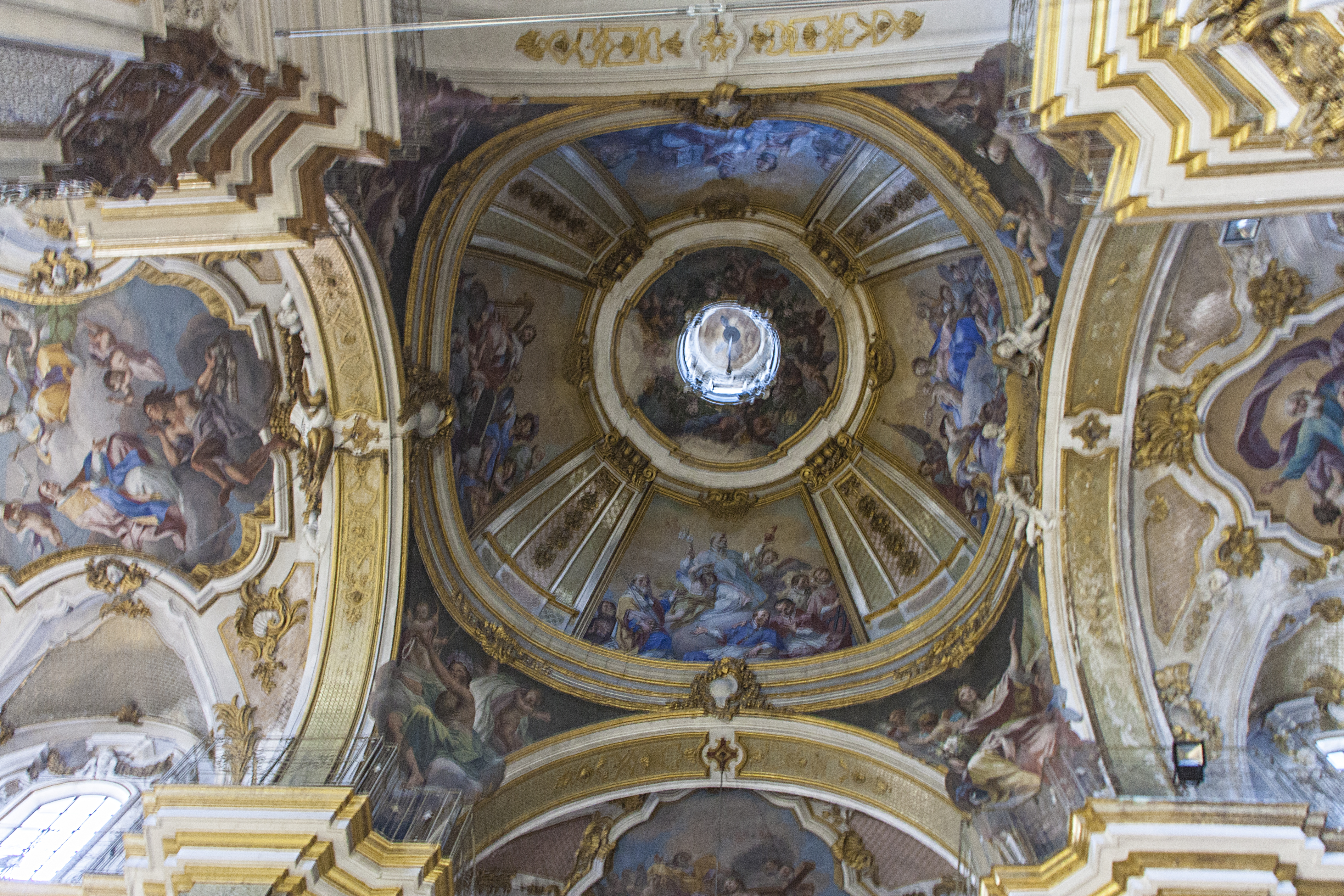 Basilica di Santa Maria Maggiore (interno)